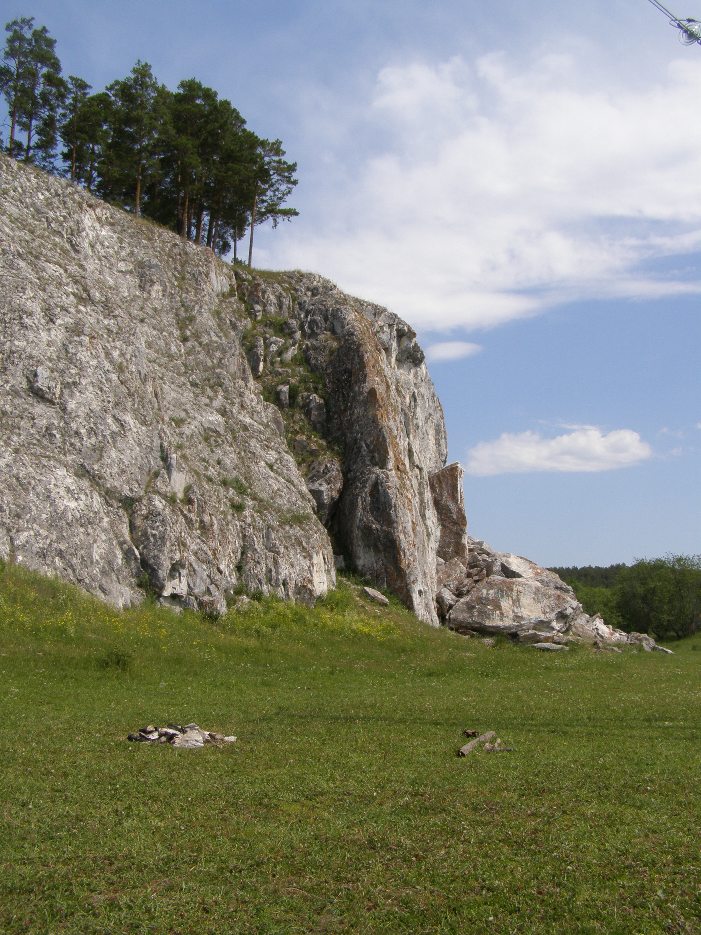 Урочище Арский камень, Белорецкий район This image is related to the protected area of Russia number 0210071